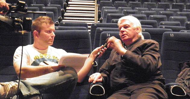 Ratko Martinović - intervju David Icke 01.12.2011., Zagreb